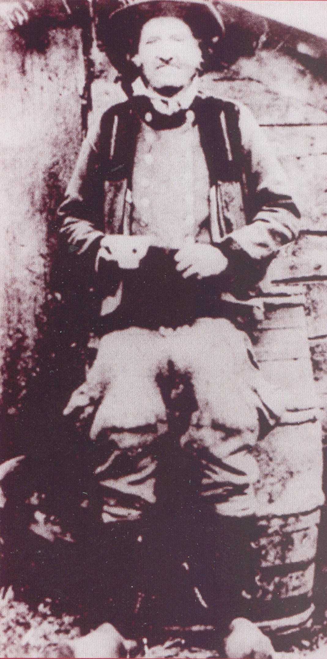 photographie du lutteur scaërois Bertrand Christien (1817-1887)